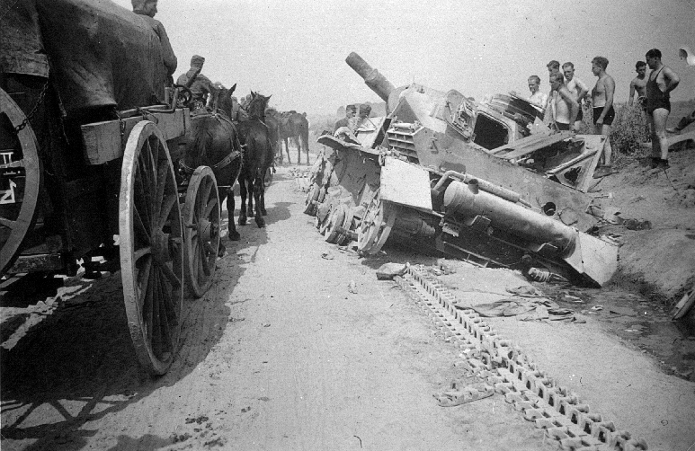 Zerstörter Panzerkampfwagen IV nach den Kämpfen bei Kowno.